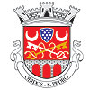 Bras-freg-s-pedro[1].jpg